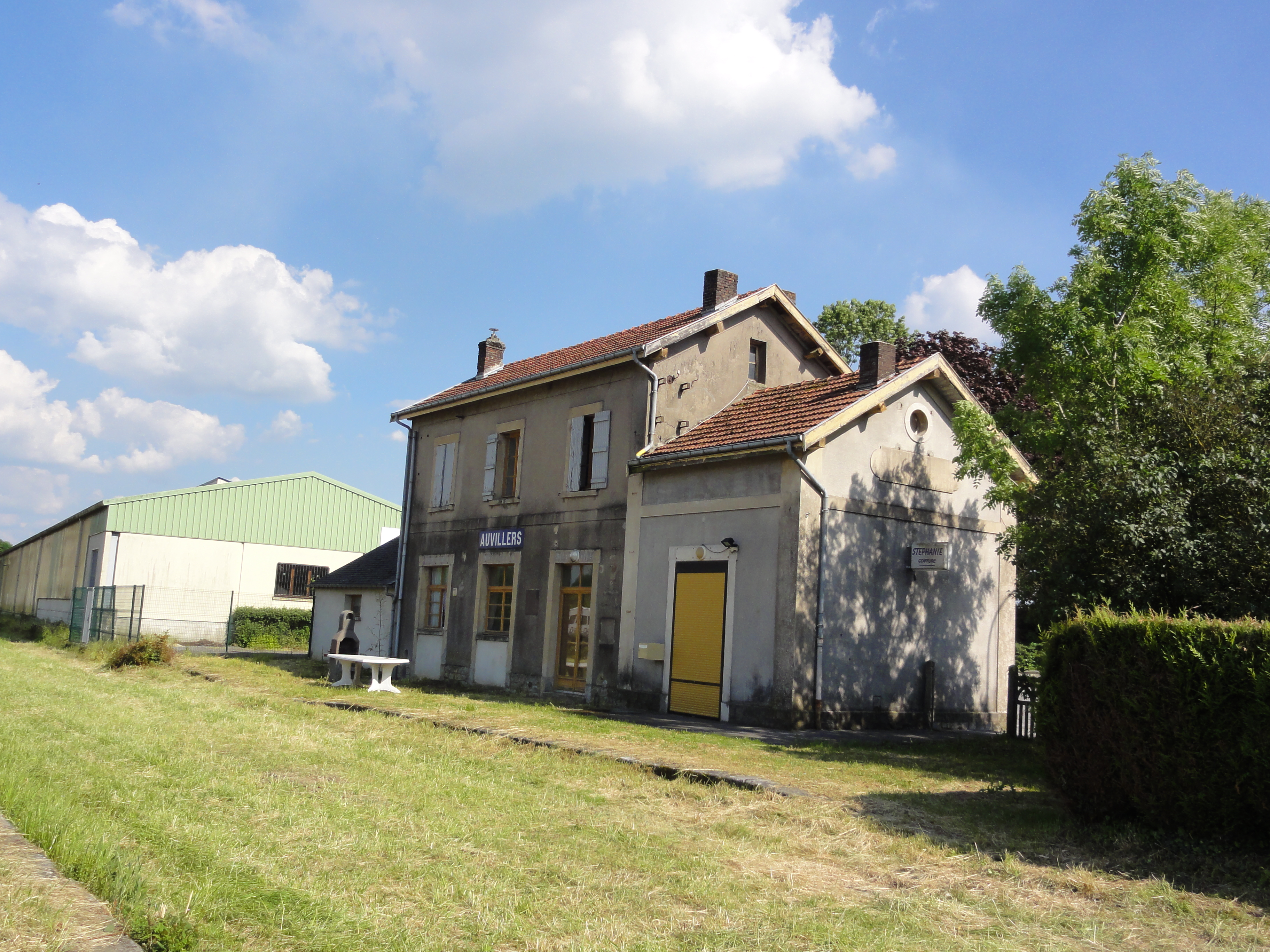 Auvillers-les-Forges (Ardennes) Ancienne gare au hameau Mon Idée